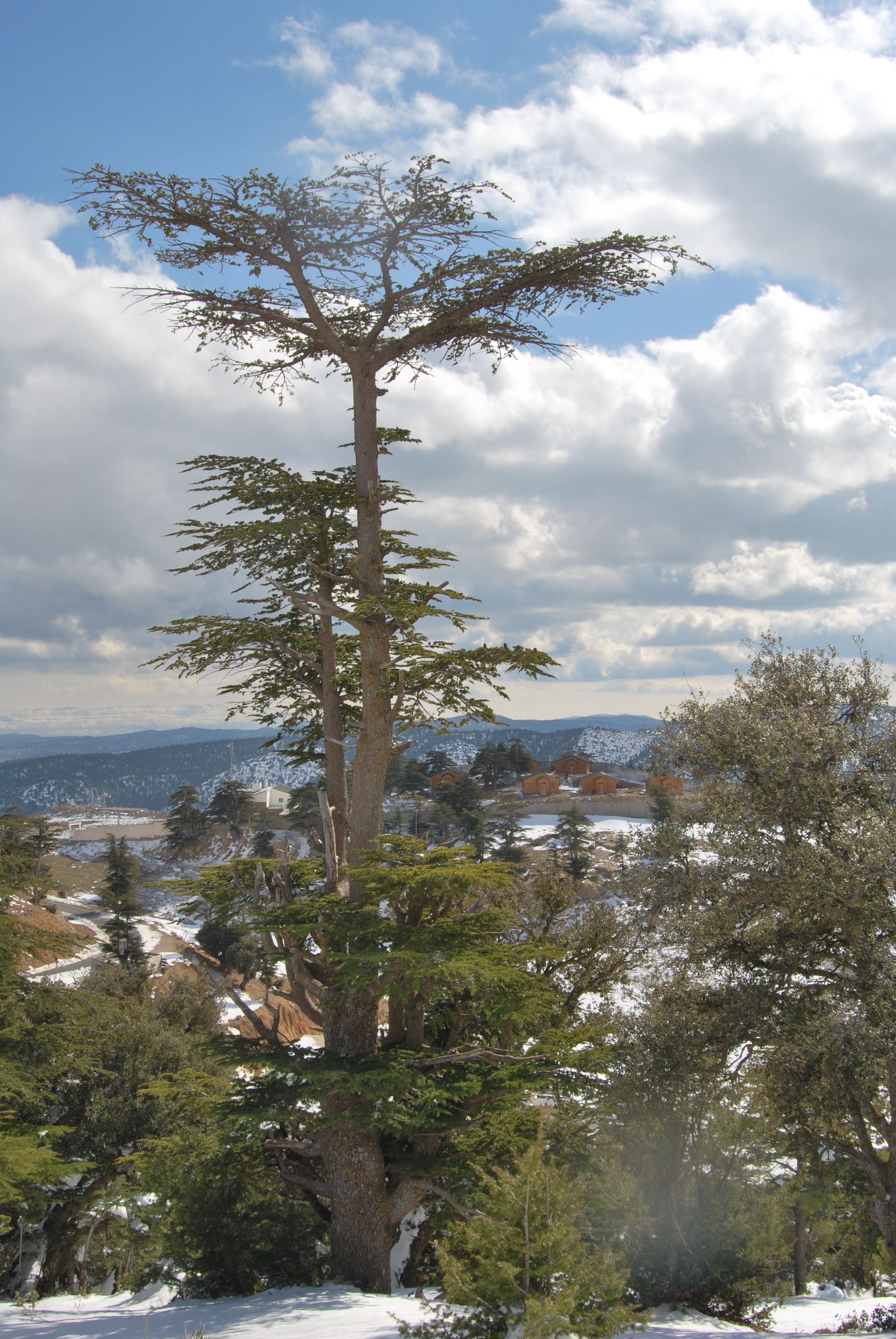 Cèdre du Chélia